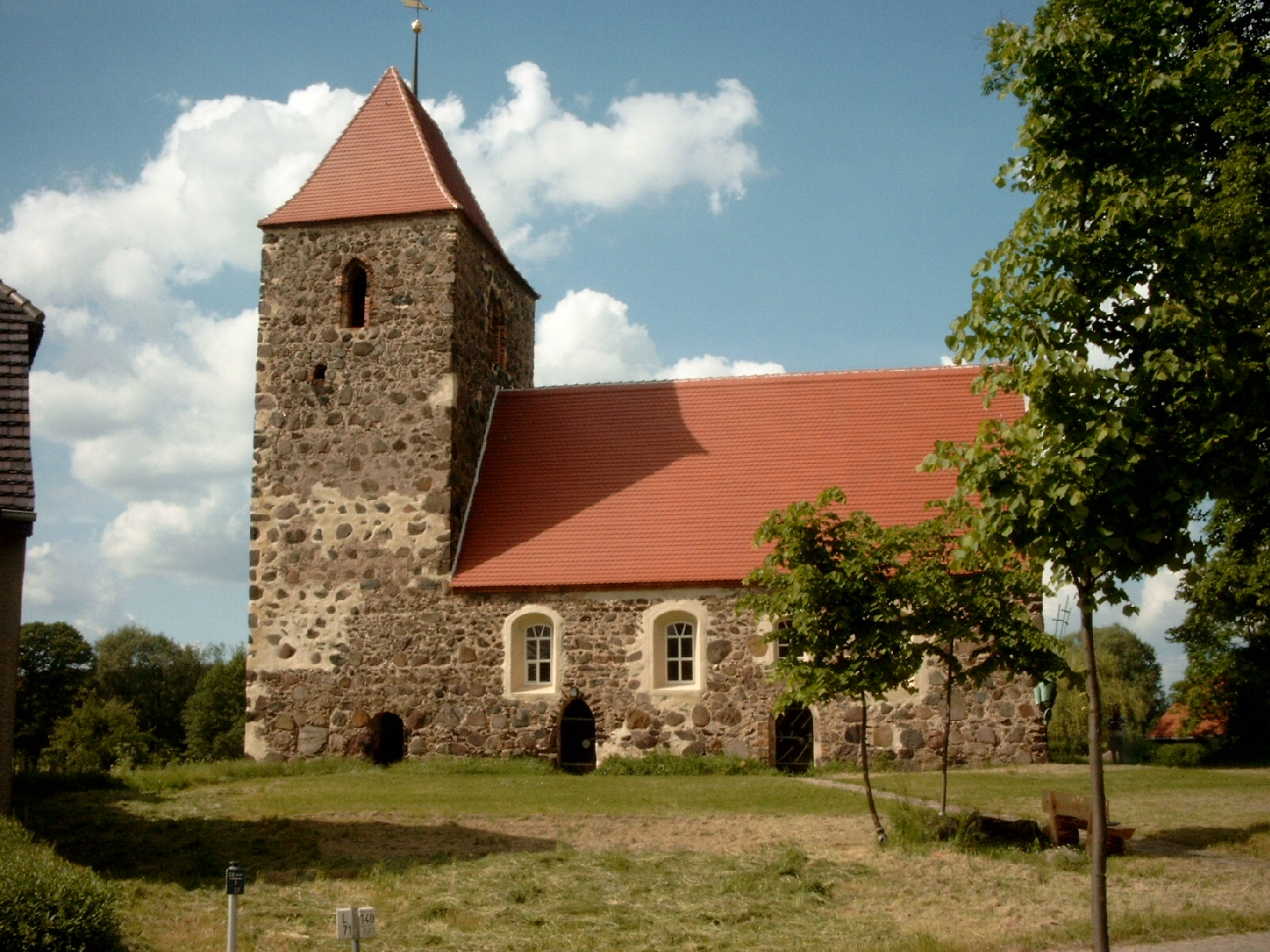 Dorfkirche Drahnsdorf, Lkr. Dahme-Spreewald, Brandenburg